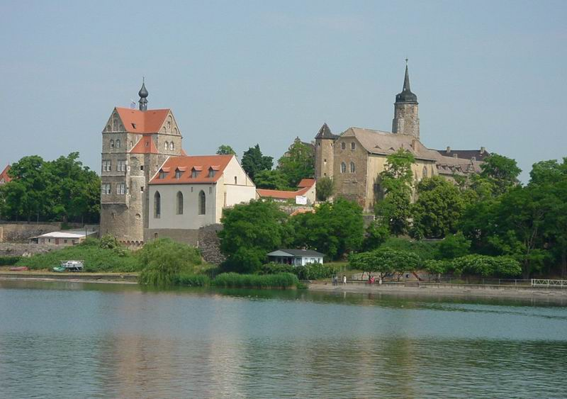 Seeburg public domain Gesamtansicht über den Süßen See eigenes Foto von 2004 Mewes 20:31, 30. Jan 2005 (CET)